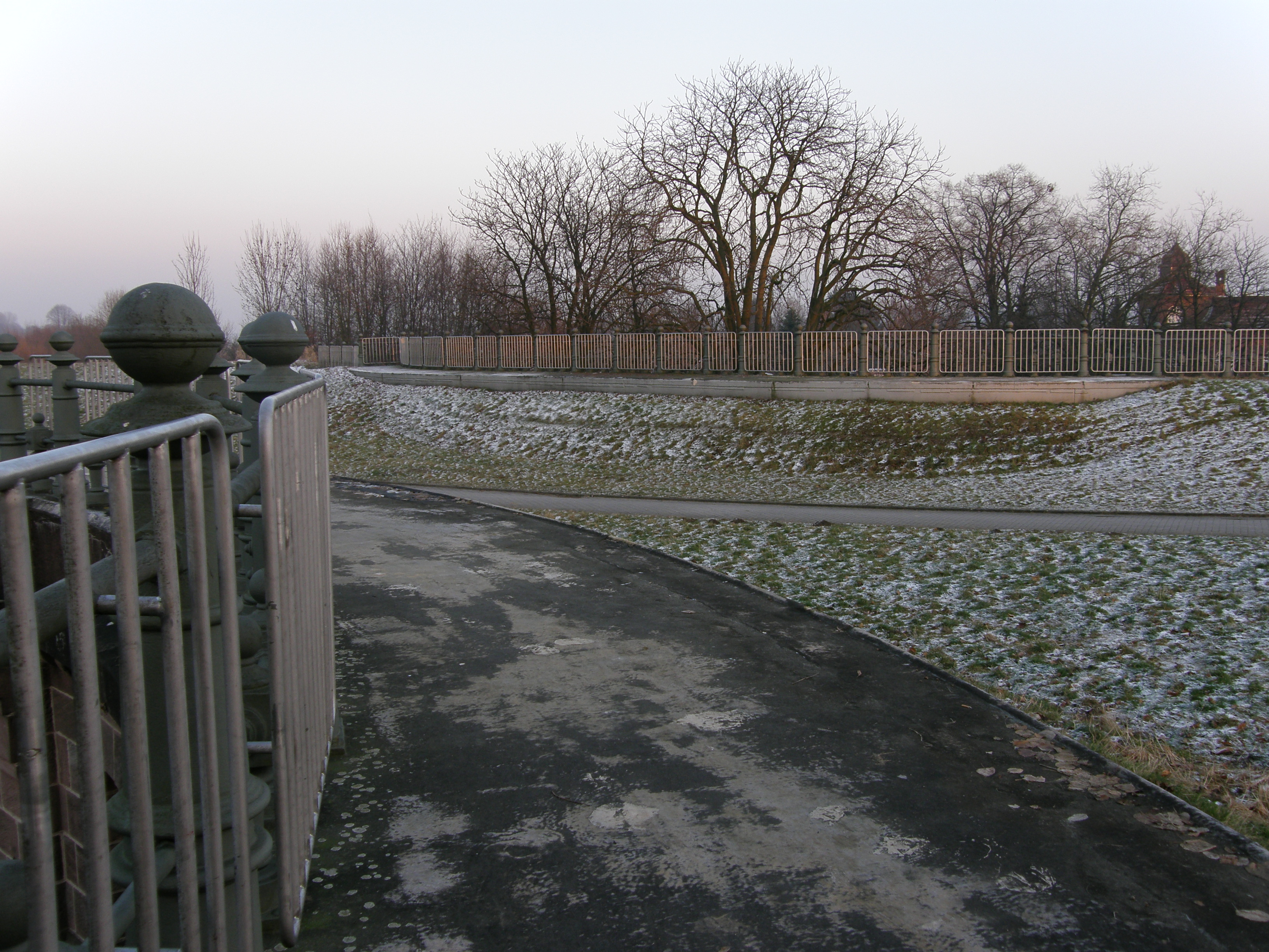 Brückentrog der Alten Fahrt des Dortmund-Ems-Kanals in Olfen, die „Schiefe Brücke“. Deutlich erkennbar die gerundete Ausführung ähnlich einer Staumauer.